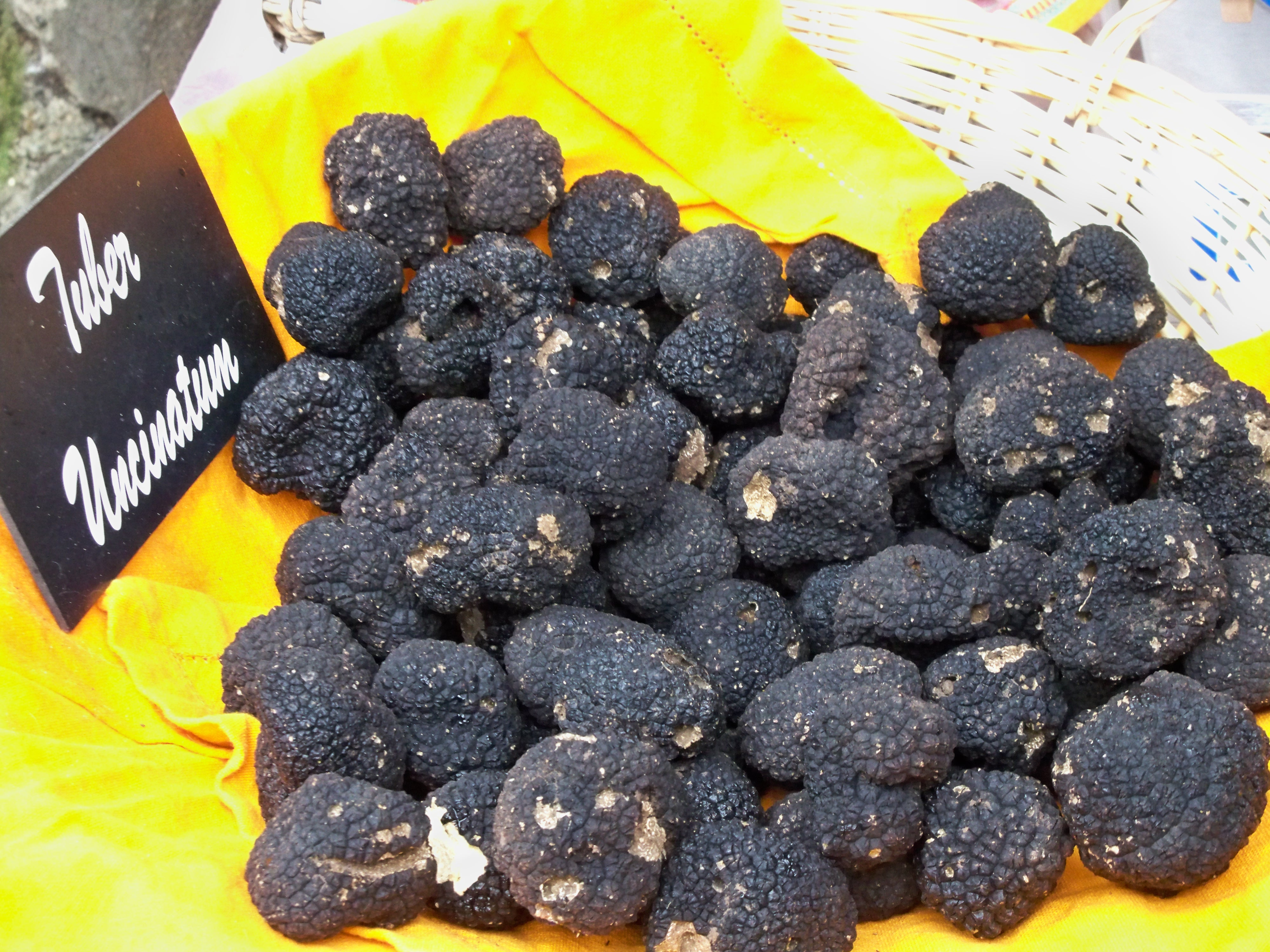 Tuber Uncinatum